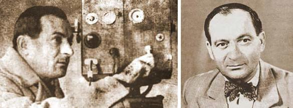 ابراهیم مرادی پیشگامان صنعت سینمای ایران